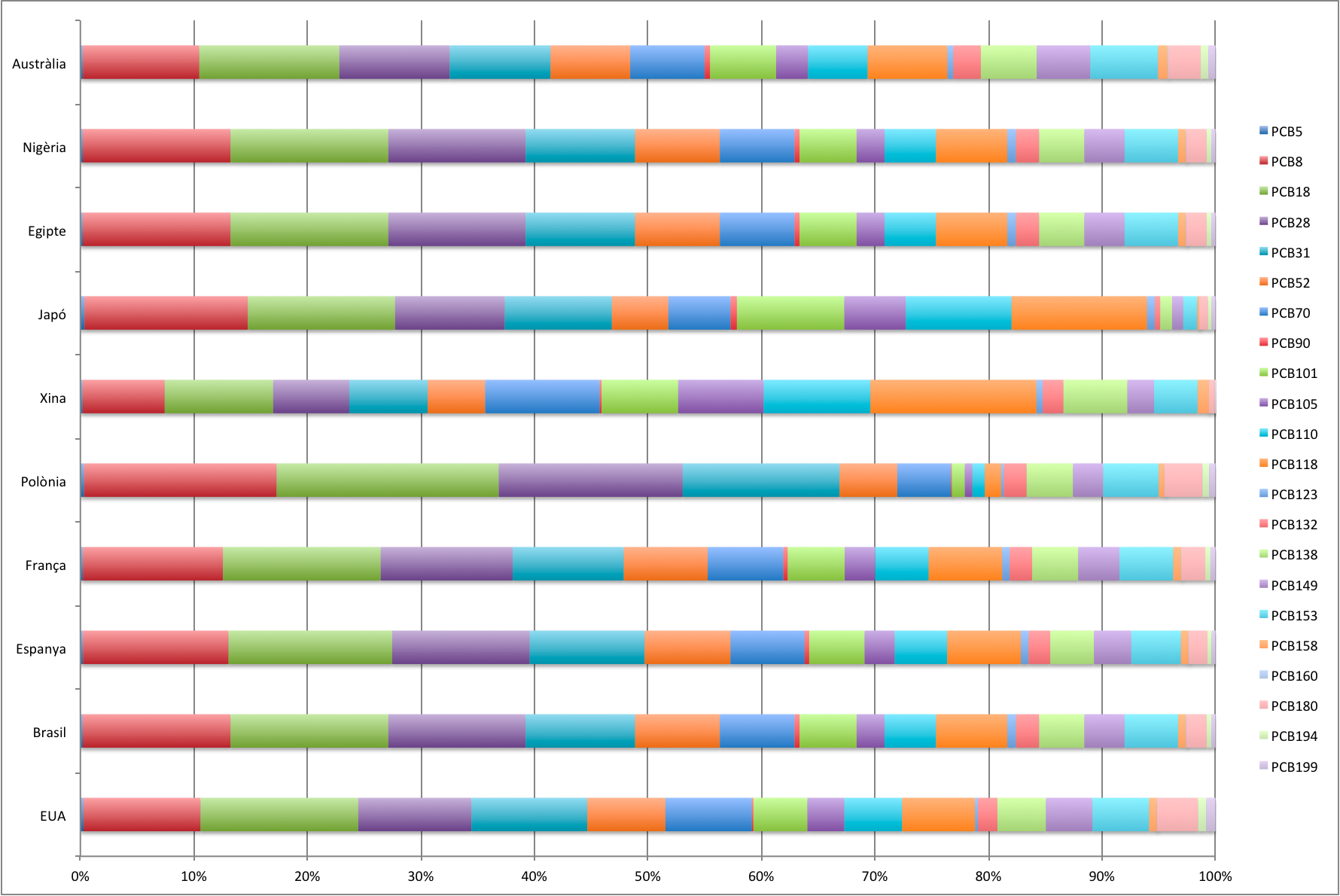 Percentatges de consum d'alguns congèneres de PCB en determinats estats segons